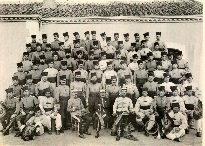 le 6e régiment de chasseurs d'afrique pose.